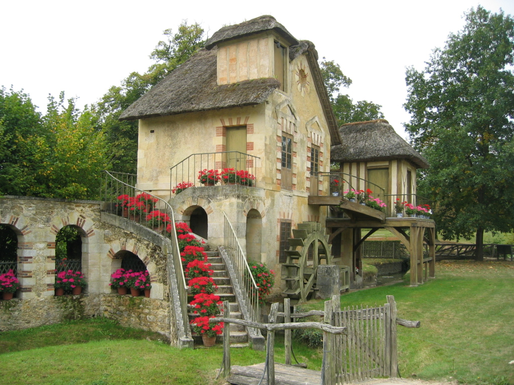 Le Moulin (Hameau de la Reine) - Versailles